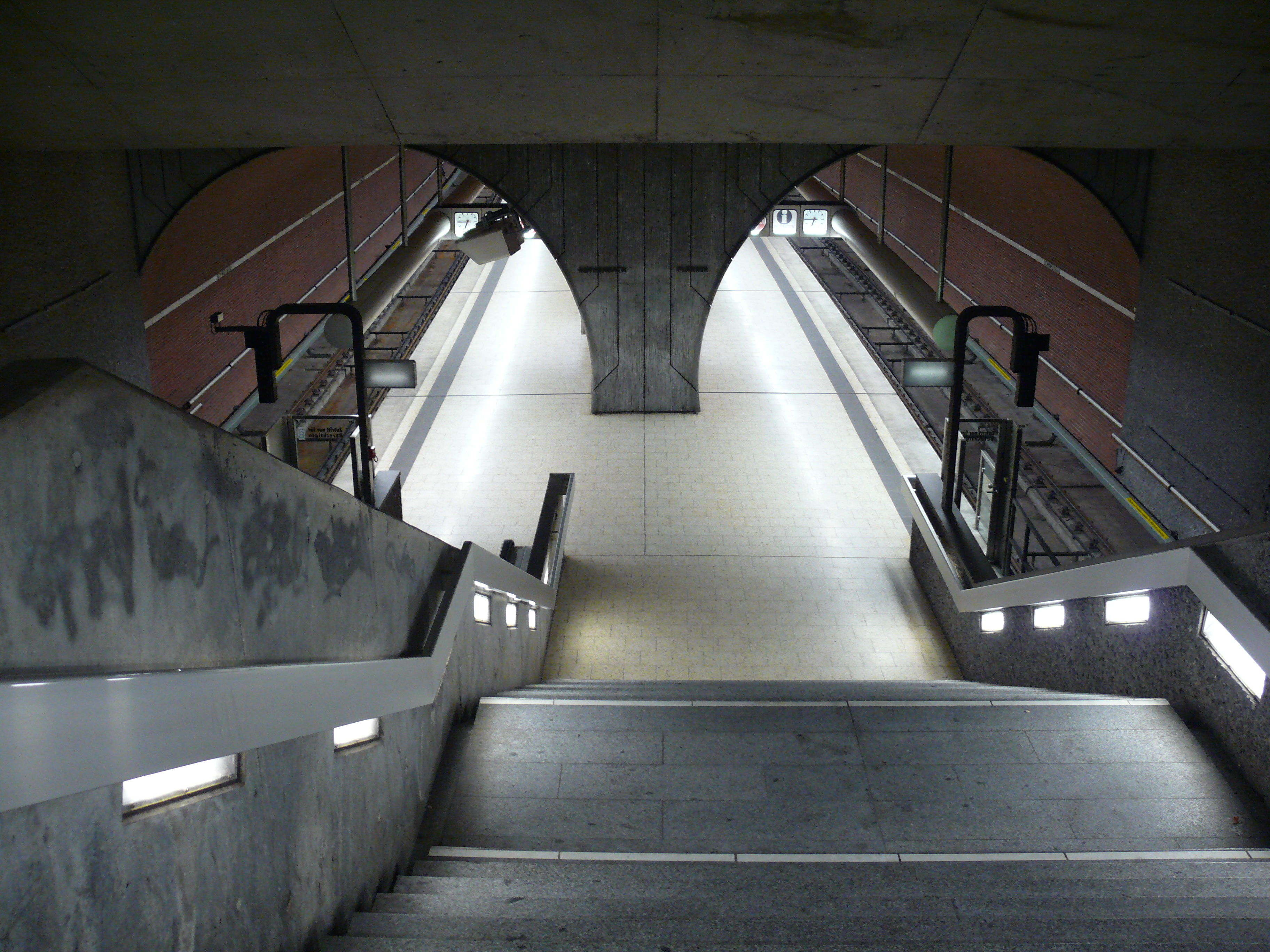 Blick vom Verteilergeschoss auf die Bahnsteigebene am U-Bahnhof Schweinau in Nürnberg.